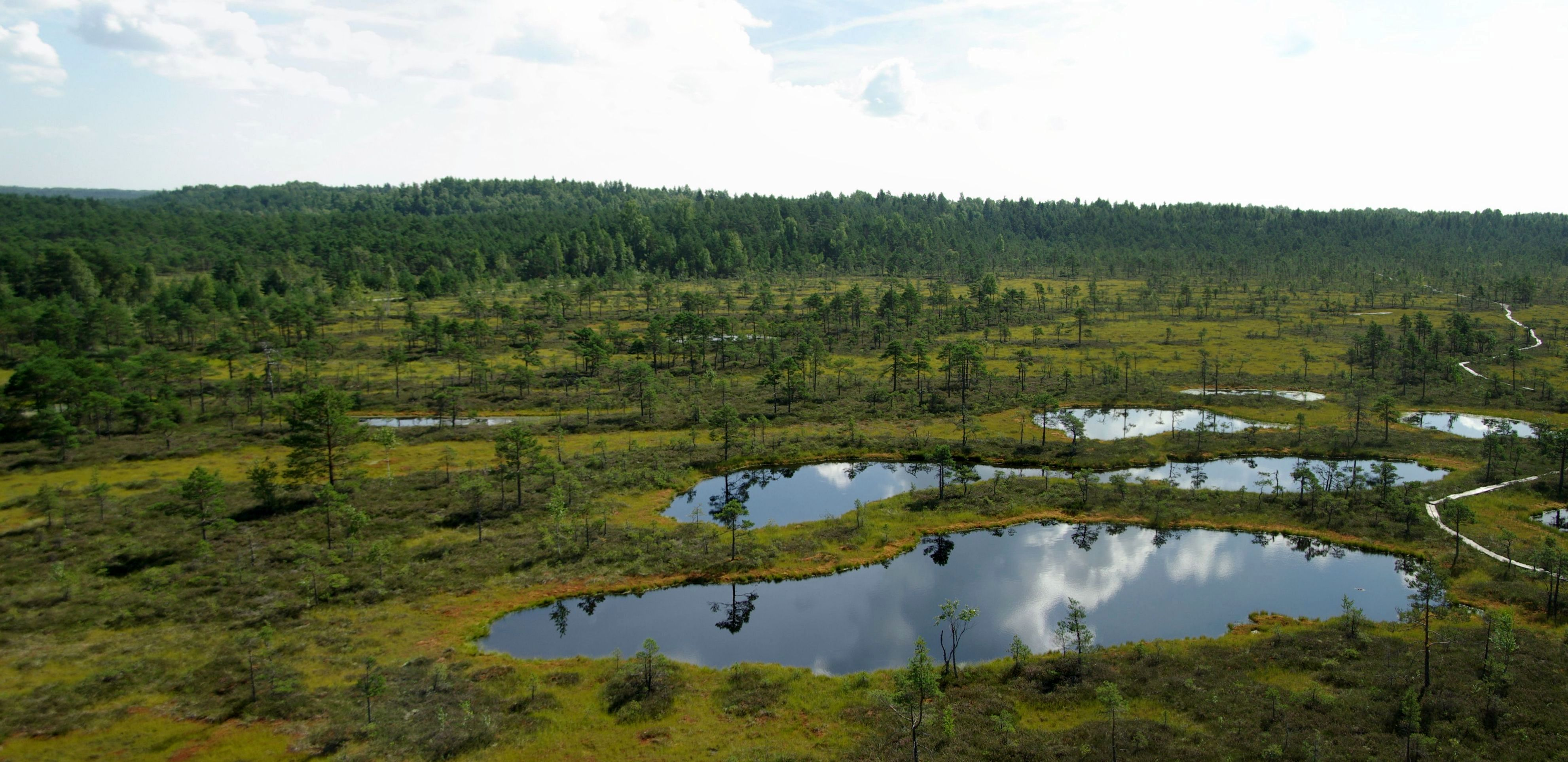 Mukri raba asub Lõuna-Raplamaal Kehtna vallas